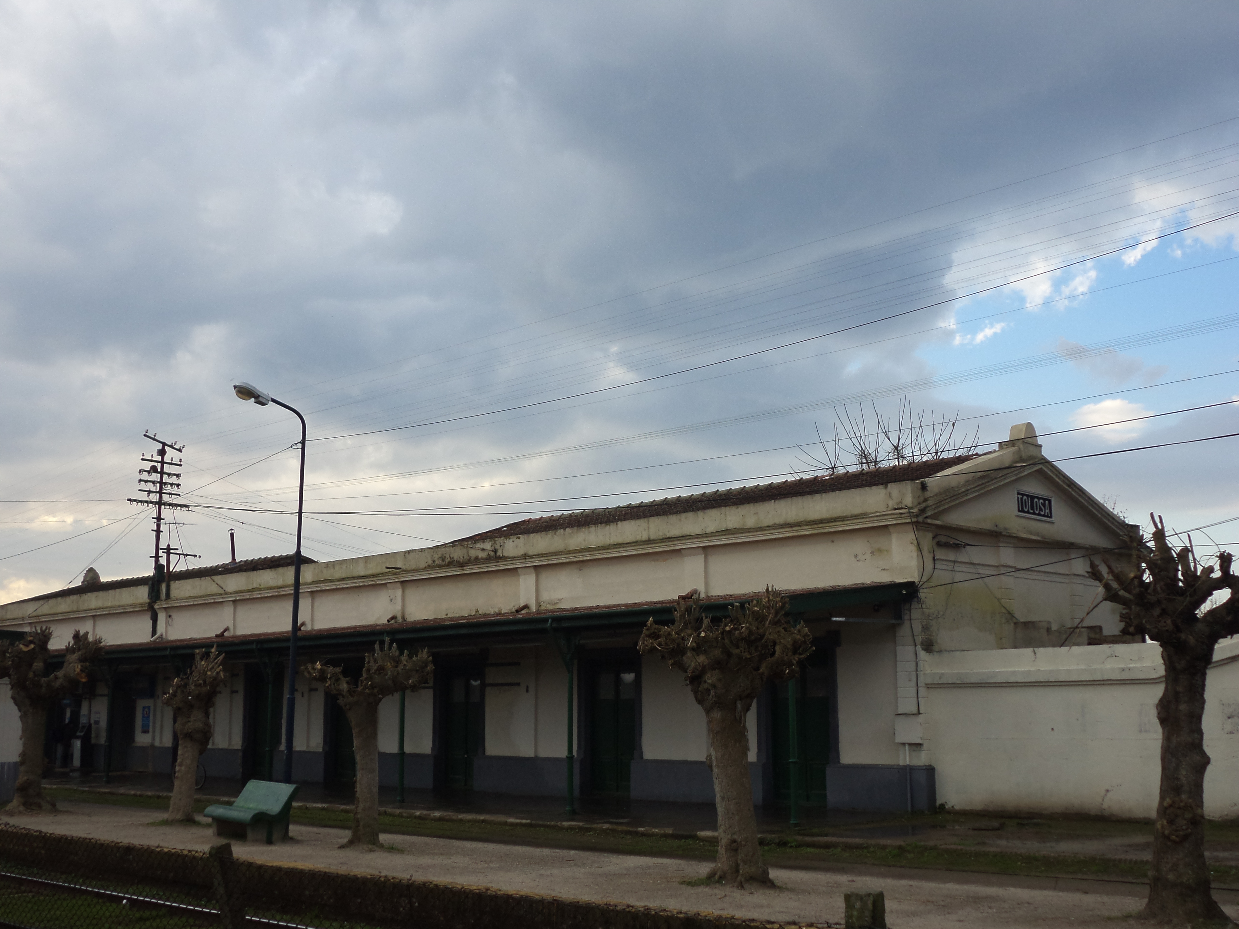 Estación Ferroviaria Tolosa, La Plata, Buenos Aires, Argentina.